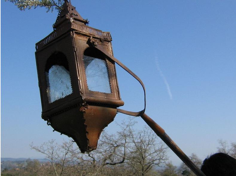 Lanterna, Processione del Venerdì Santo nel bosco, Chiesa della Compagnia Santa Croce Farnetella (Siena)